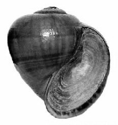 Pila ampullacea